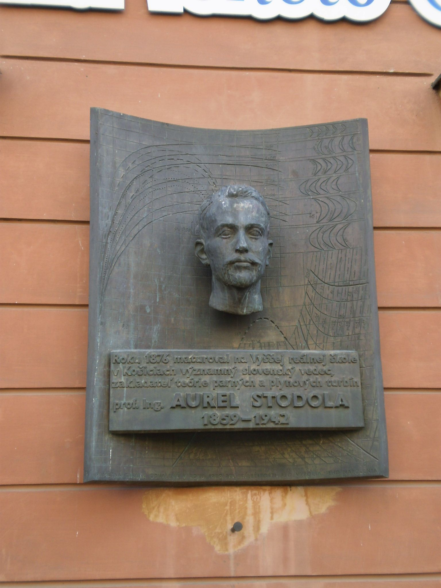 Stodola emléktábla Kassán, az akkori Főreál iskola falán, ahol a 1876-ban érettségizett. A dombormű hátterében egy gőzturbina lapátrács, egy hőmérséklet-entrópia (T-s) diagram és egy a fokozat hatásfokát ábrázoló diagram látható.